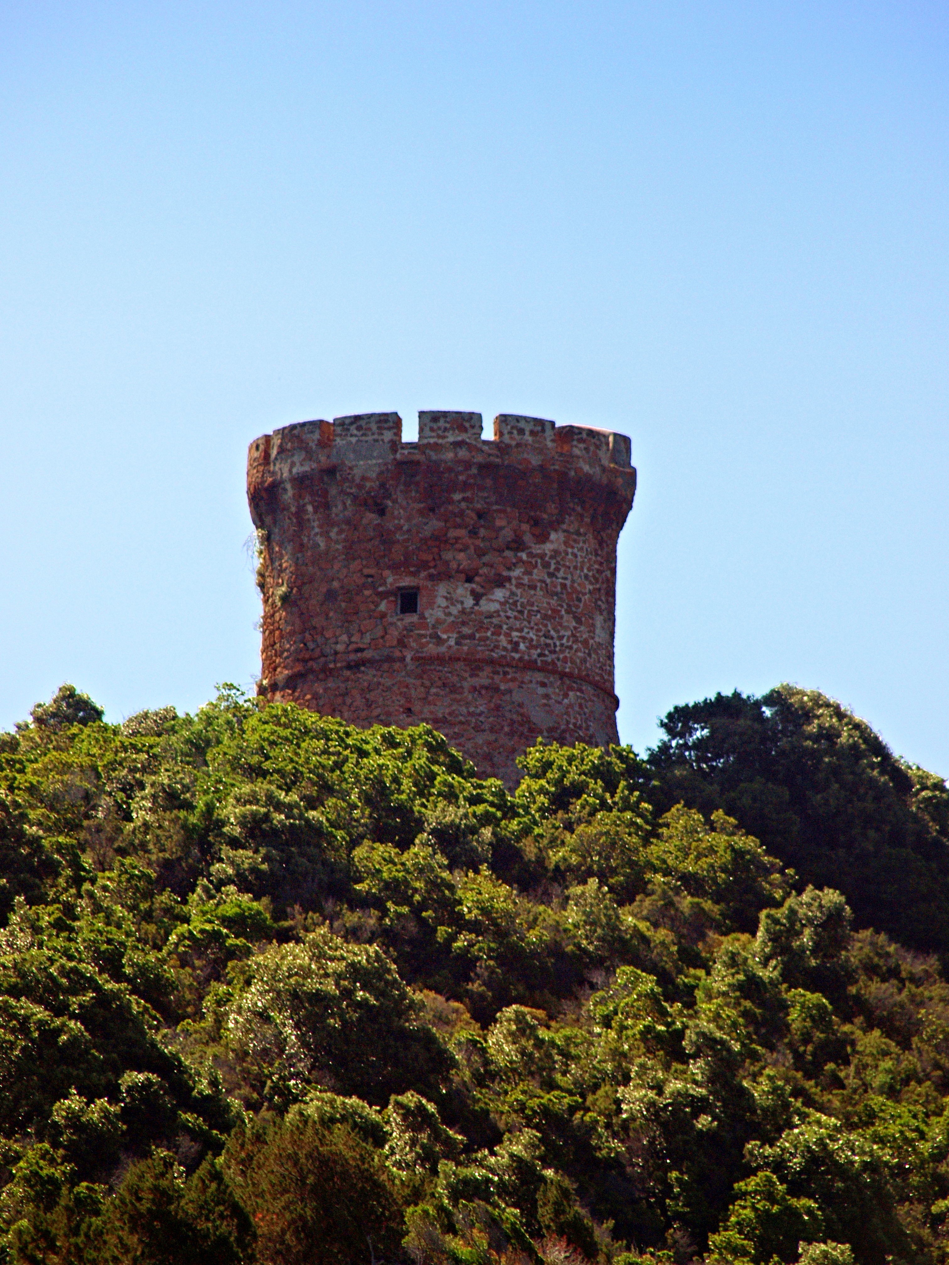 Osani, Ouest Corse (Corse) - Tour génoise ruinée d'Elbo, dominant la marine d'Elbo, en limite de la Réserve naturelle de Scandola